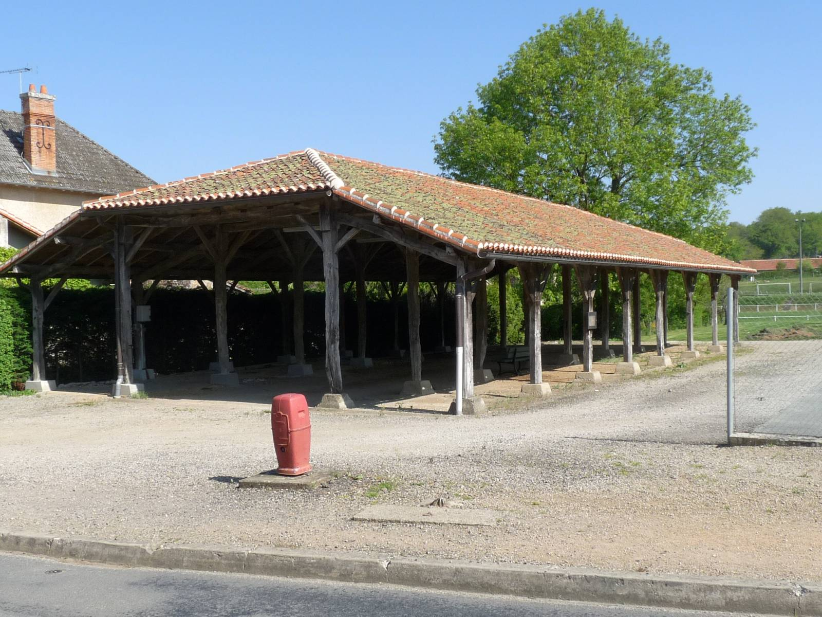 Halles d'Abzac, Charente, France